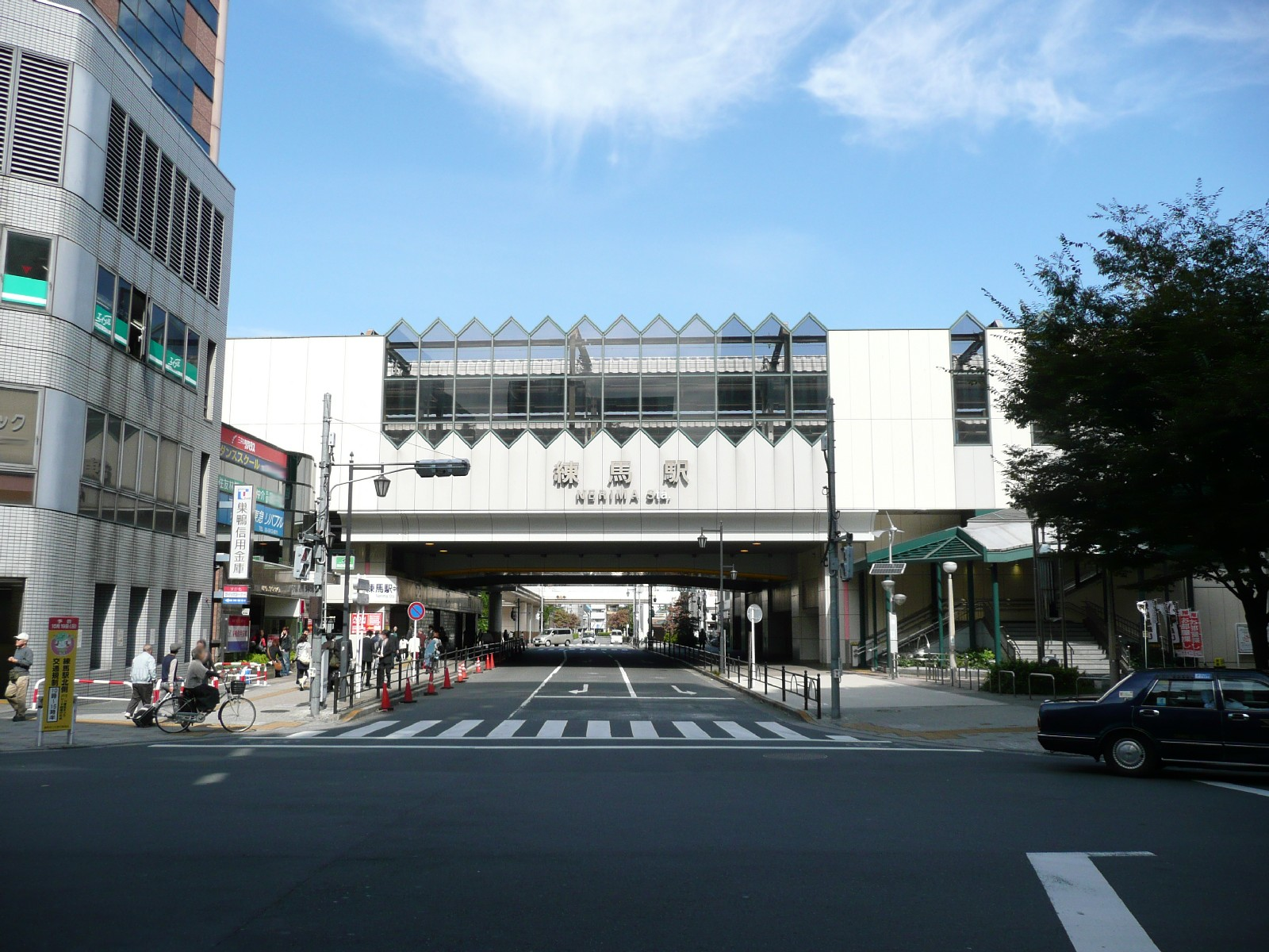 練馬駅中央口・南口。道路を挟み左側に中央口、右側に南口がある